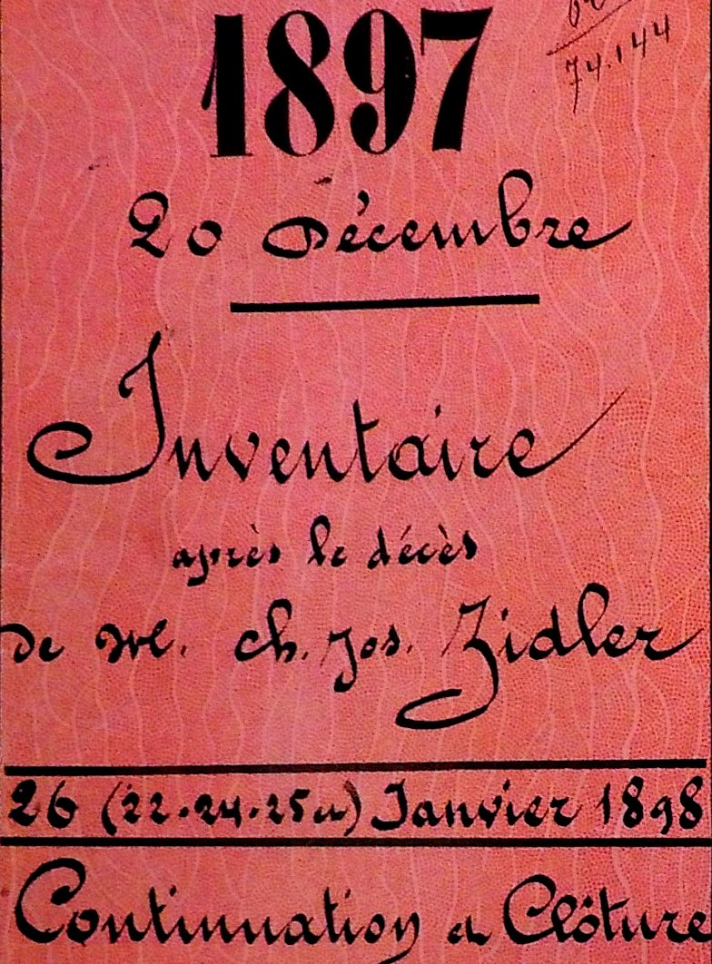 Il permet de connaître la fondation du cabaret et ses premières années (1889-1897)